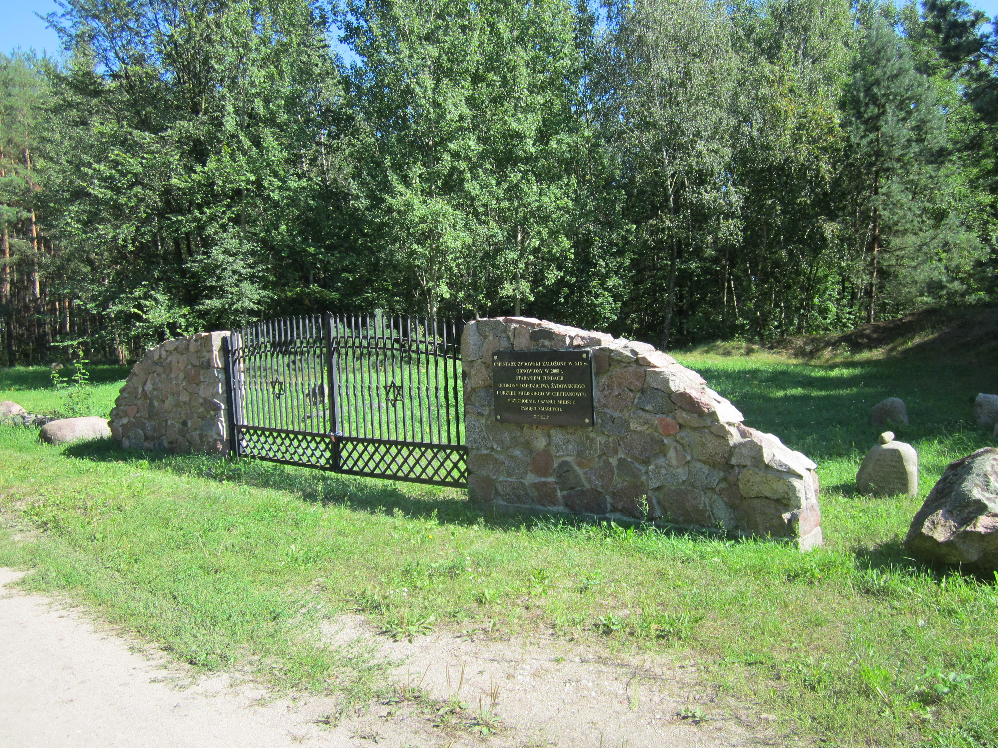 Cmentarz ten położony jest za cmentarzem katolickim przy ul. Sienkiewicza. Znajdują się na nim nieliczne macewy, teren jest ogrodzony kamieniami polnymi. Przy głównej bramie wjazdowej na teren cmentarza znajduje się tablica z następującą treścią: „Cmentarz Żydowski założony w XIX w. odnowiony w 2008 r. staraniem Fundacji Ochrony Dziedzictwa Żydowskiego i Urzędu Miejskiego w Ciechanowcu. Przechodniu, uszanuj miejsce pamięci zmarłych”. 4 Listopada 2008 r. obchodzono 66 rocznicę likwidacji getta w Ciechanowcu.